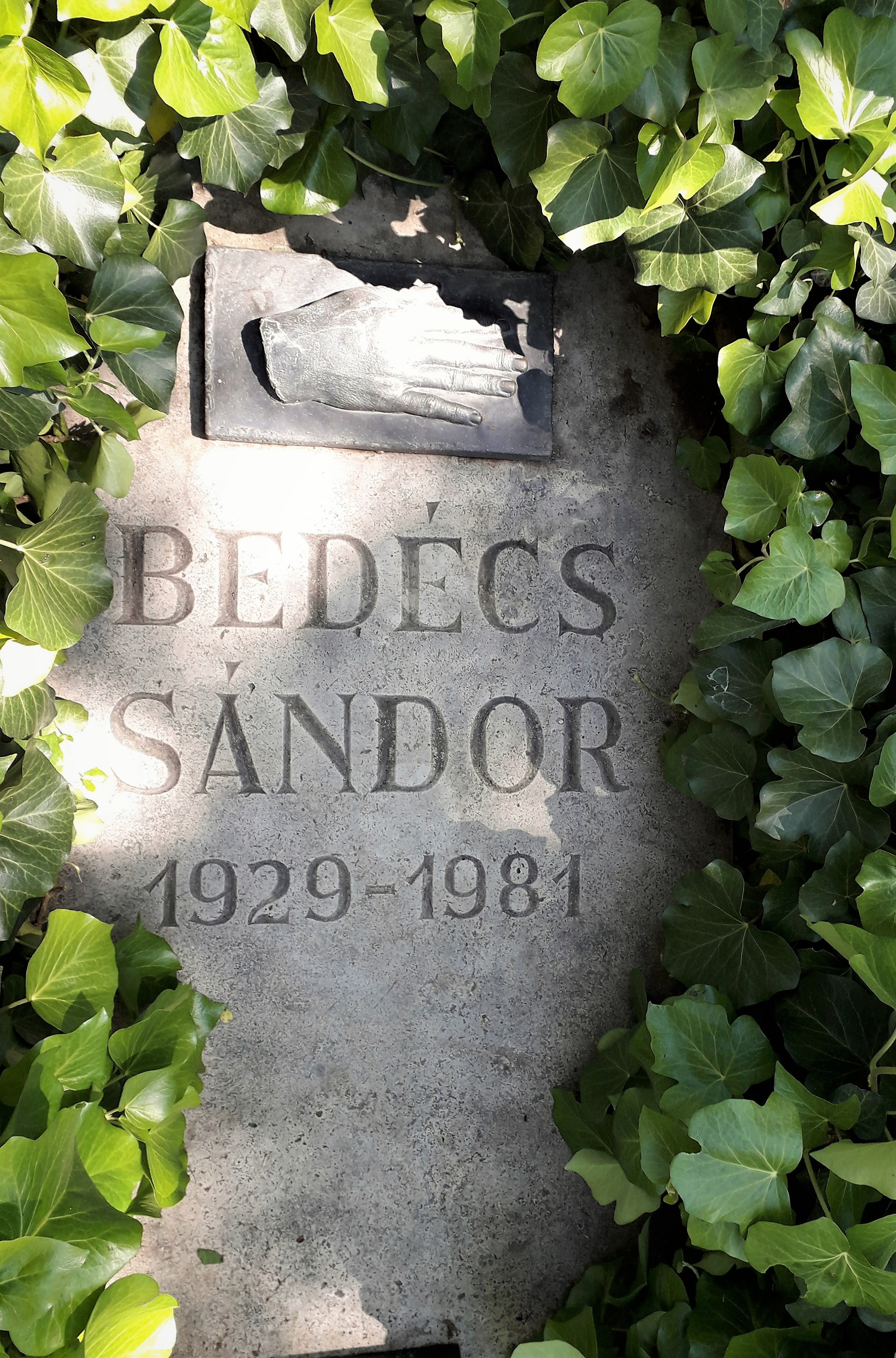 Bedécs Sándor belsőépítész, iparművész (1929-1981) síremléke a farkasréti temető 36/1 parcella 1 sor 119. sírhelyén.